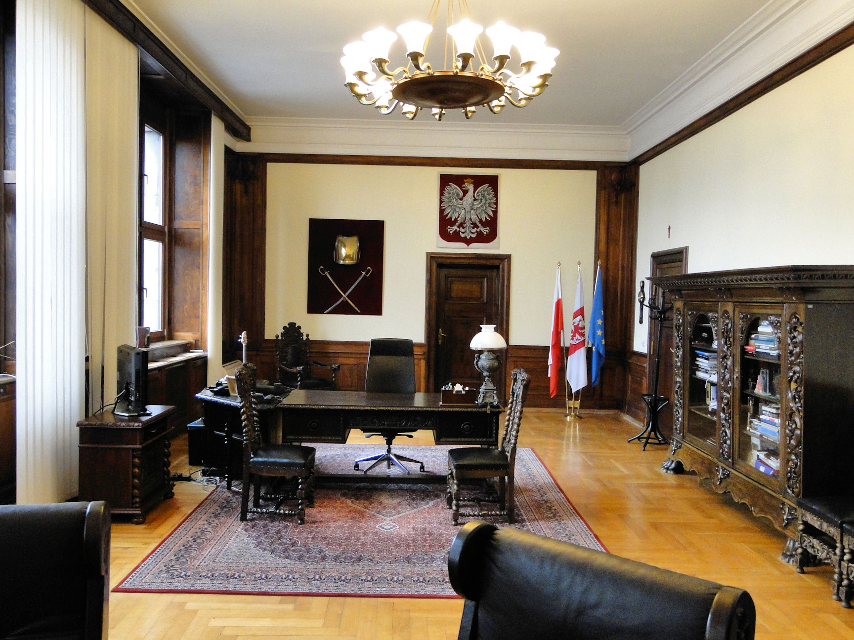 Zachodniopomorski Urząd Wojewódzki w Szczecinie